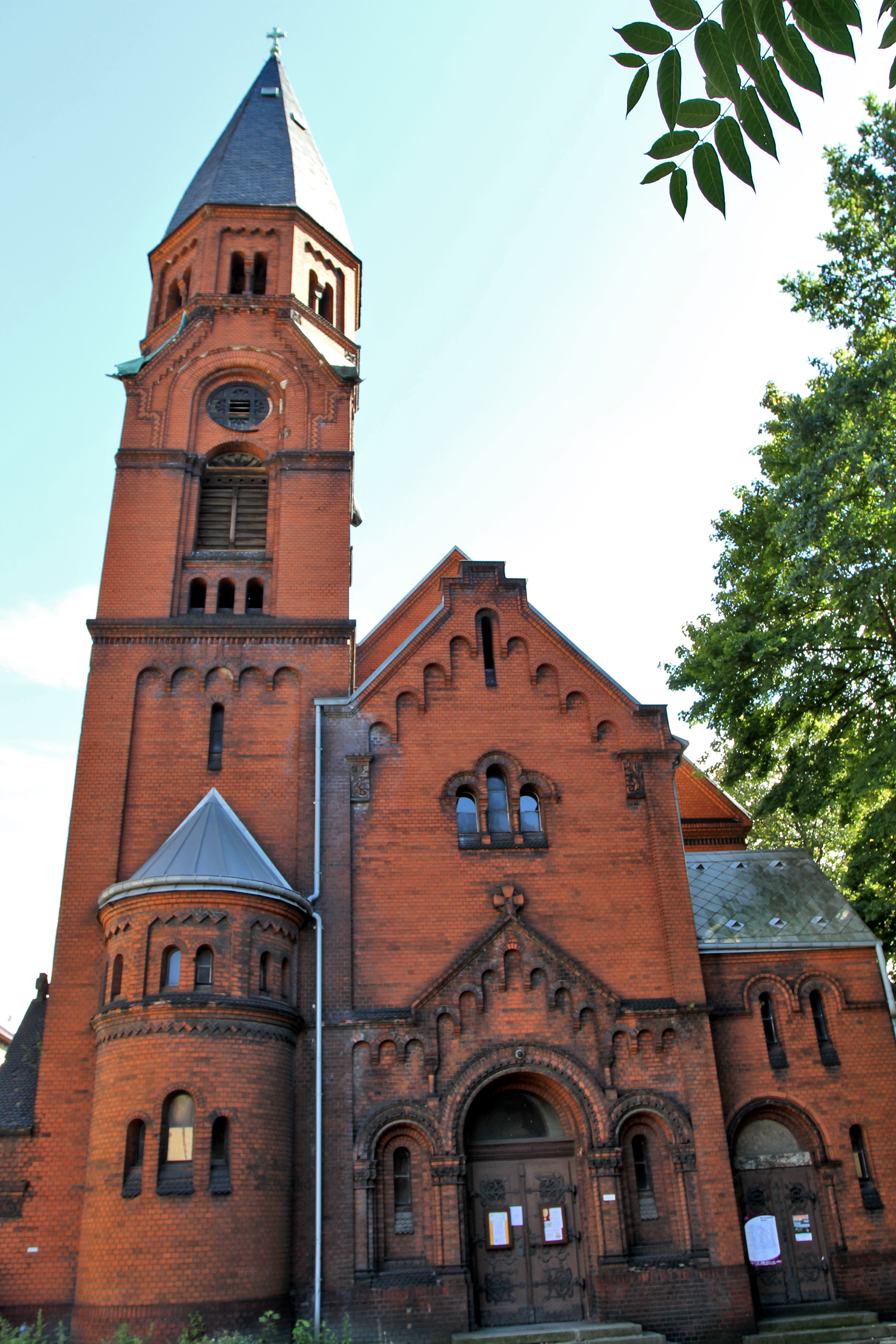 Kostel apoštola sv. Pavla (Ústí nad Labem), Bratislavská, Horova, Ústí nad Labem